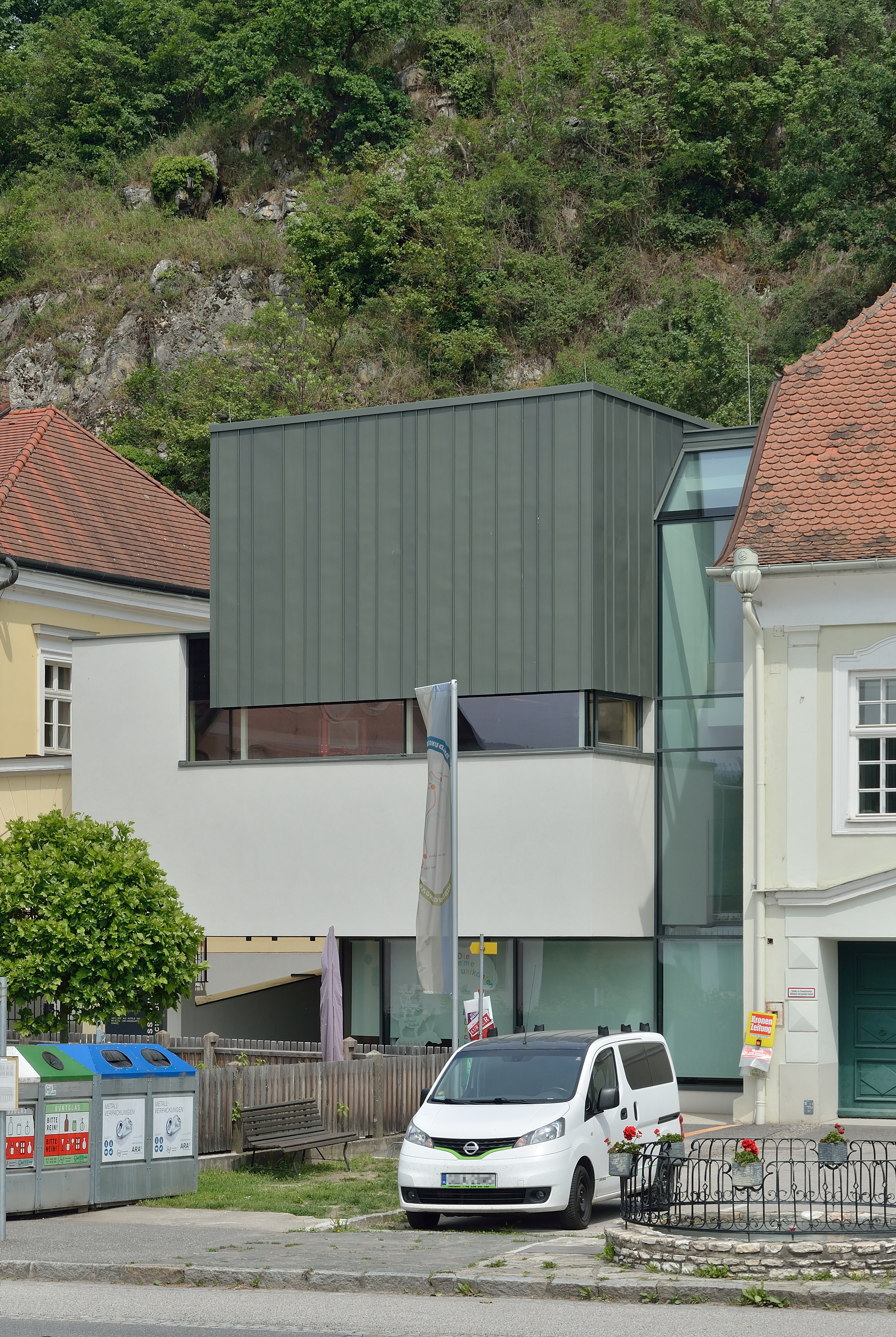 Die Volksschule in Marbach an der Donau ist das Erstlingswerk von Clemens Holzmeister. 2014 wurde westlich ein moderner Erweiterunsbau angestellt. Der neue Gebäudeteil beherbergt auch die Musikschule Nibelungengau.